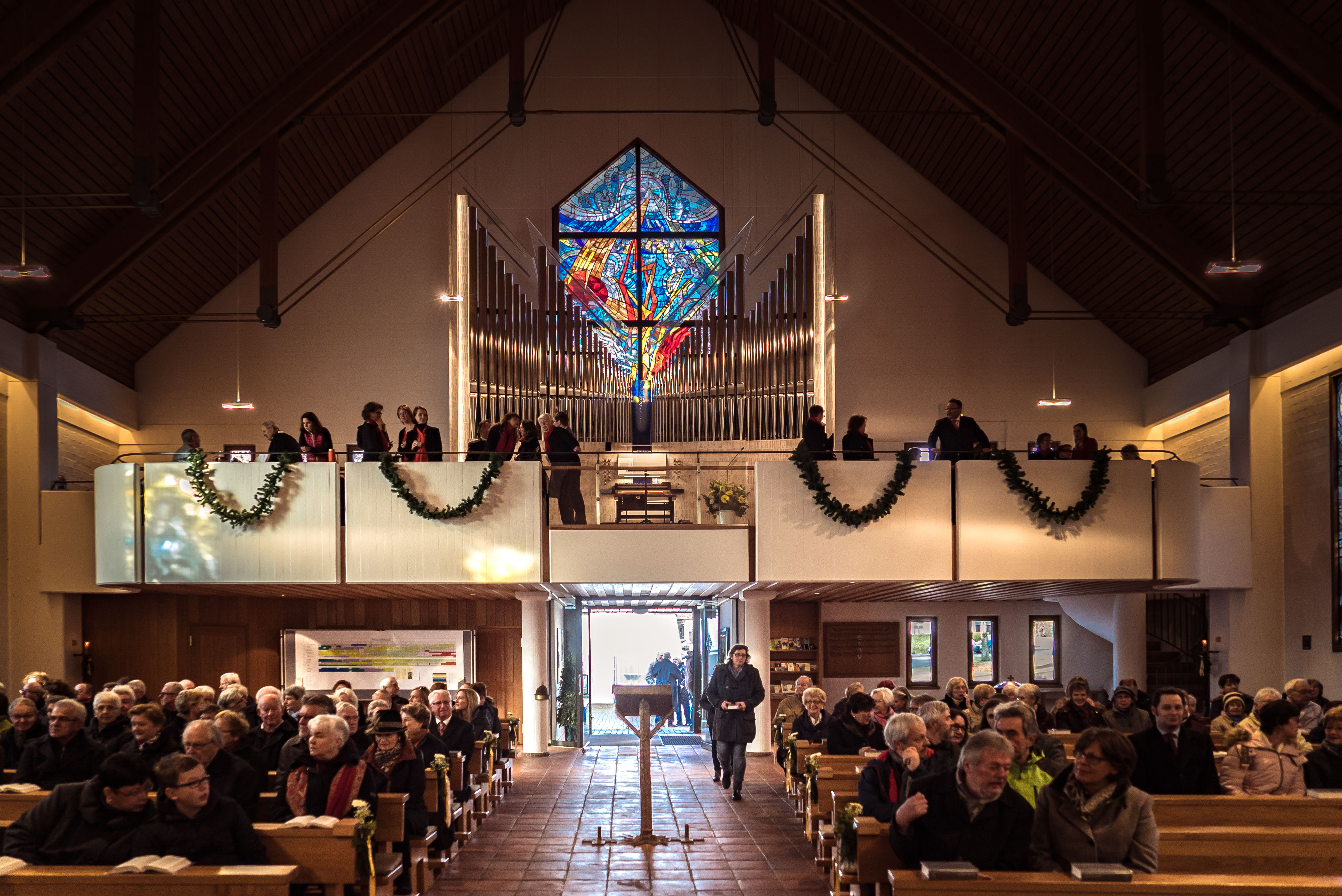 Dieses Bild zeigt den Kirchenraum von St. Benedikt in Regensburg Oberisling am Tag der Orgelweihe, dem 20.11.2016.